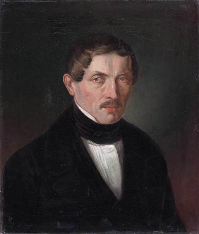 Беларуская (тарашкевіца): Партрэт Яна Баршчэўскага (Jan Barščeŭski)